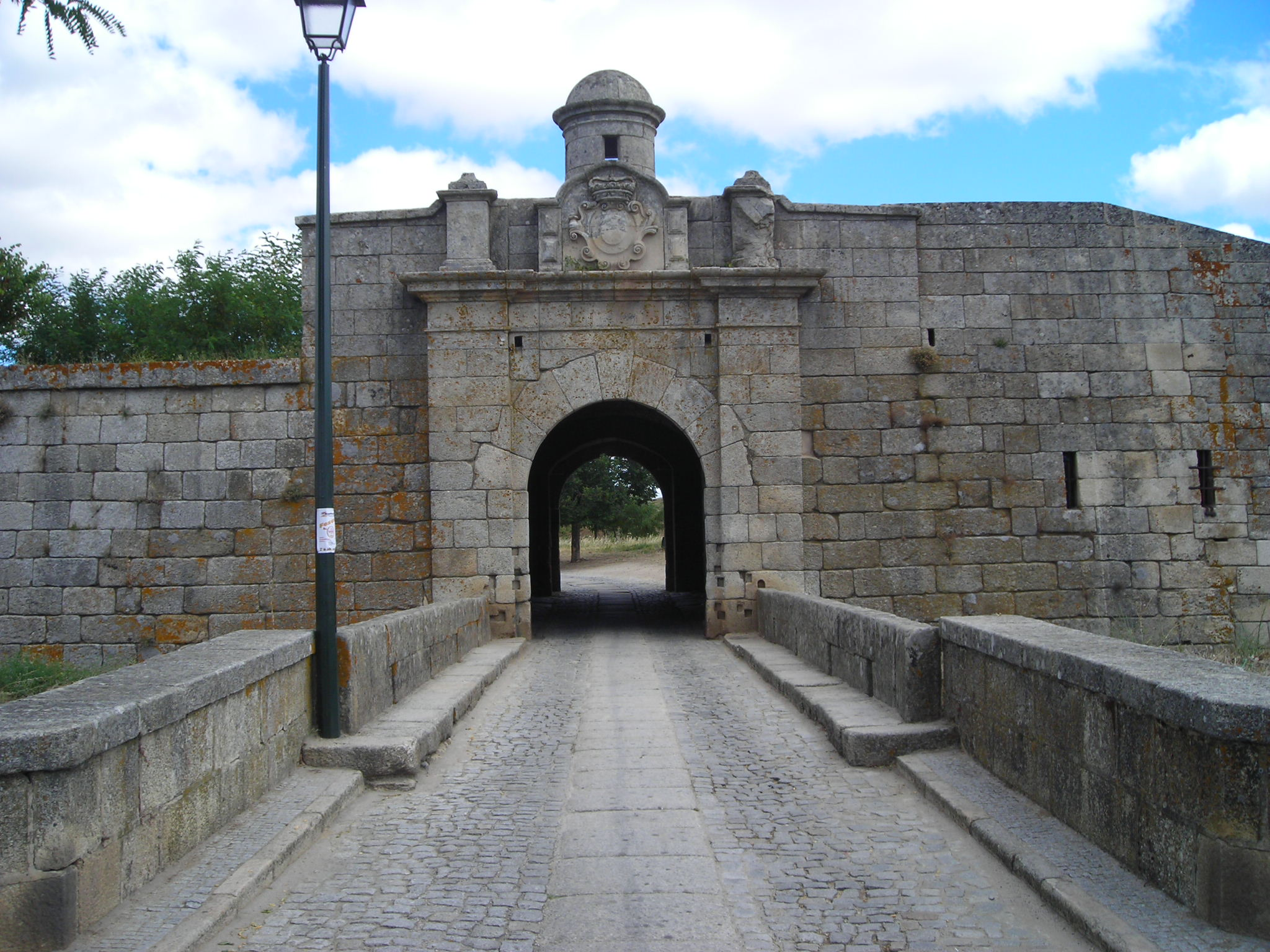 Almeida (Portugal) : Puerta de la muralla